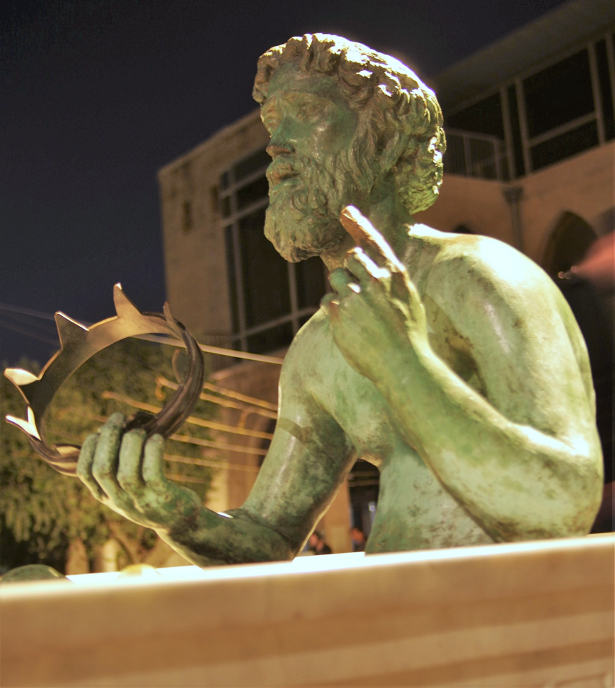 Statua del monento Eureka scolpita in Haifa